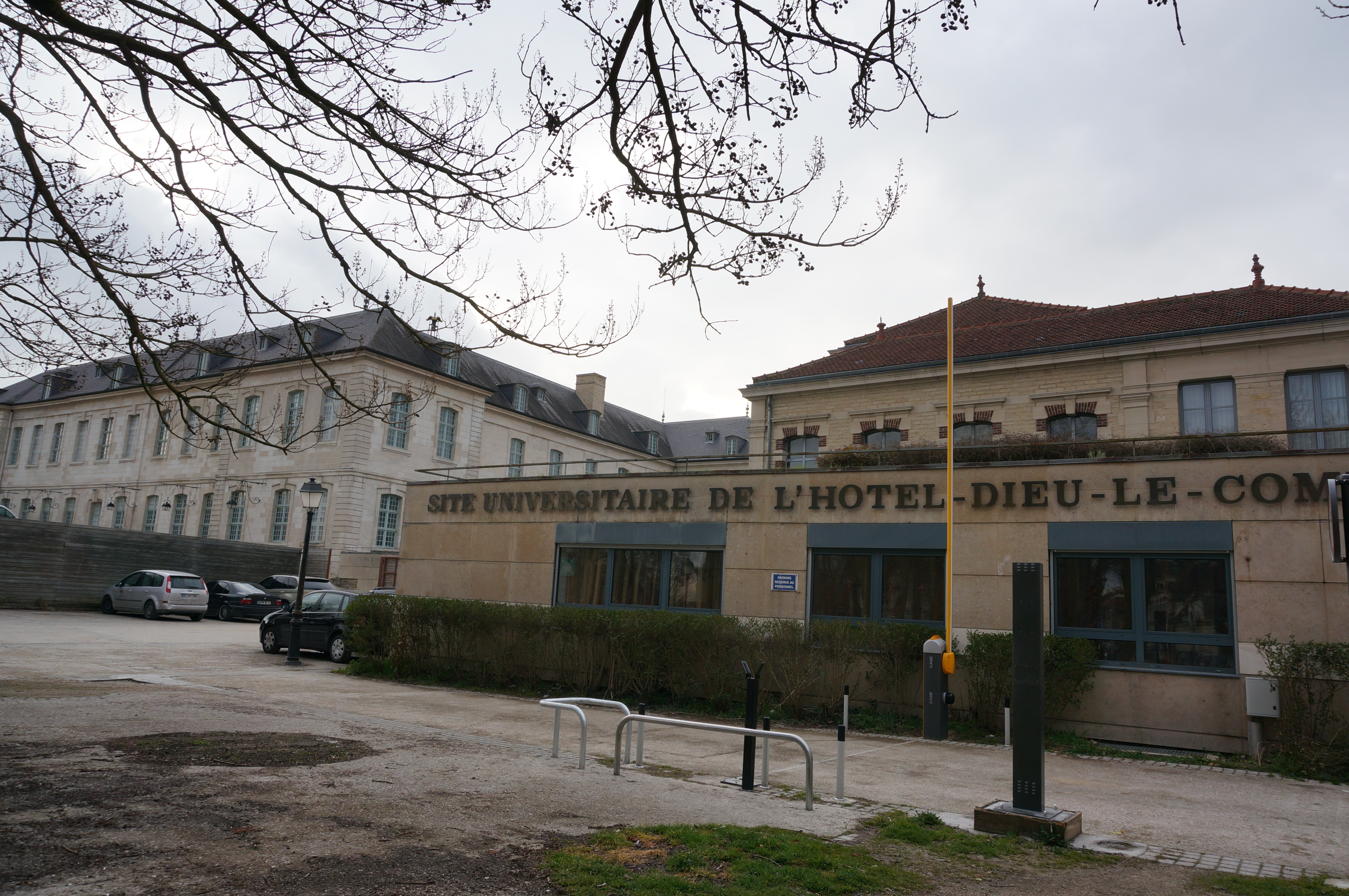 Église Saint-Nicolas de Troyes.